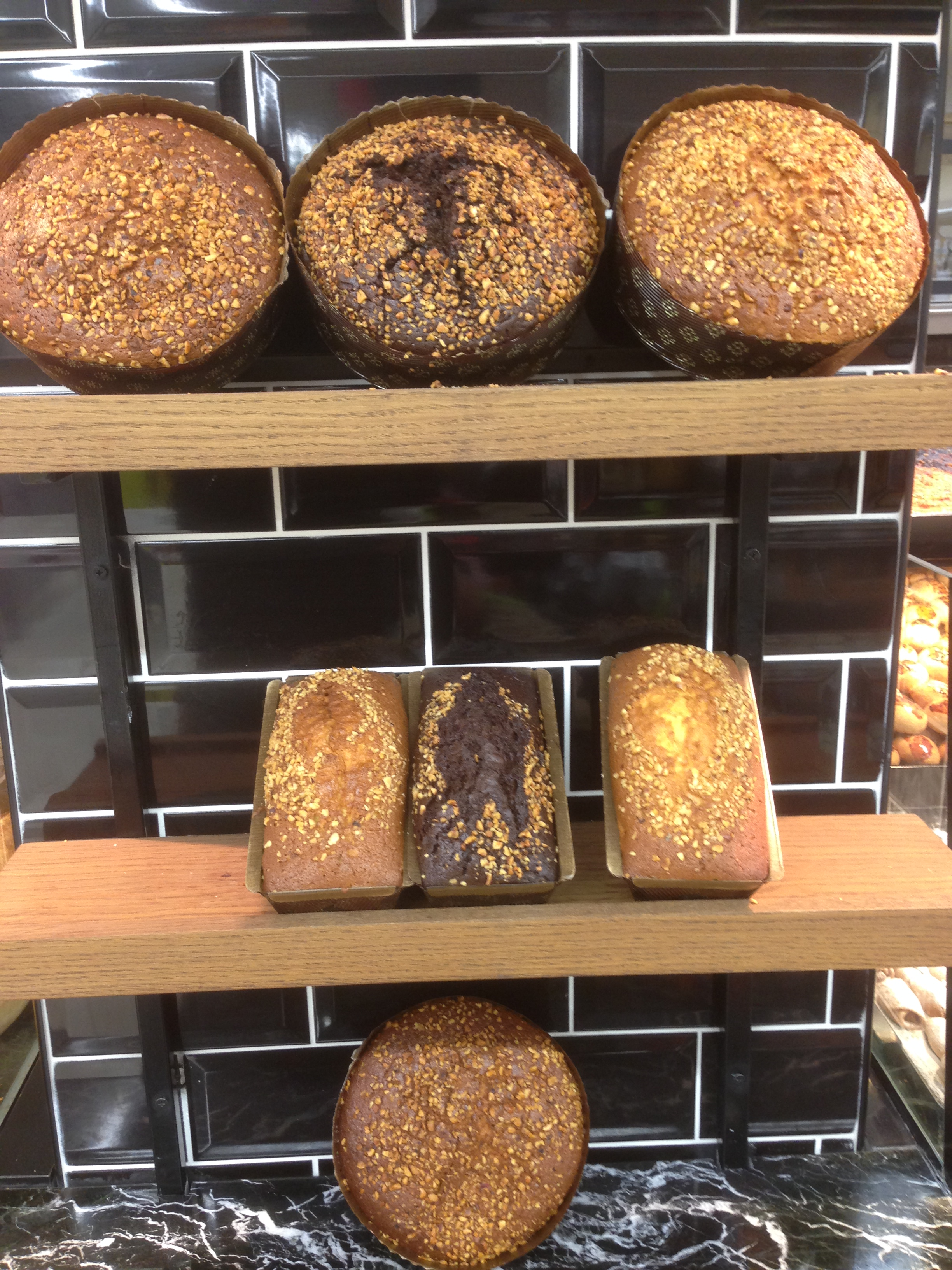 çeşitli ekmeklerden görüntüler